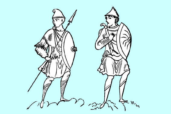 Português do Brasil: Dois soldados portanto cetras